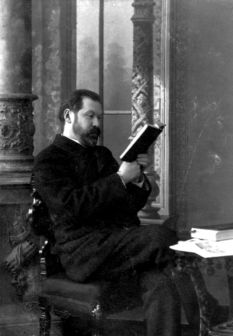 Буренин, Виктор Петрович